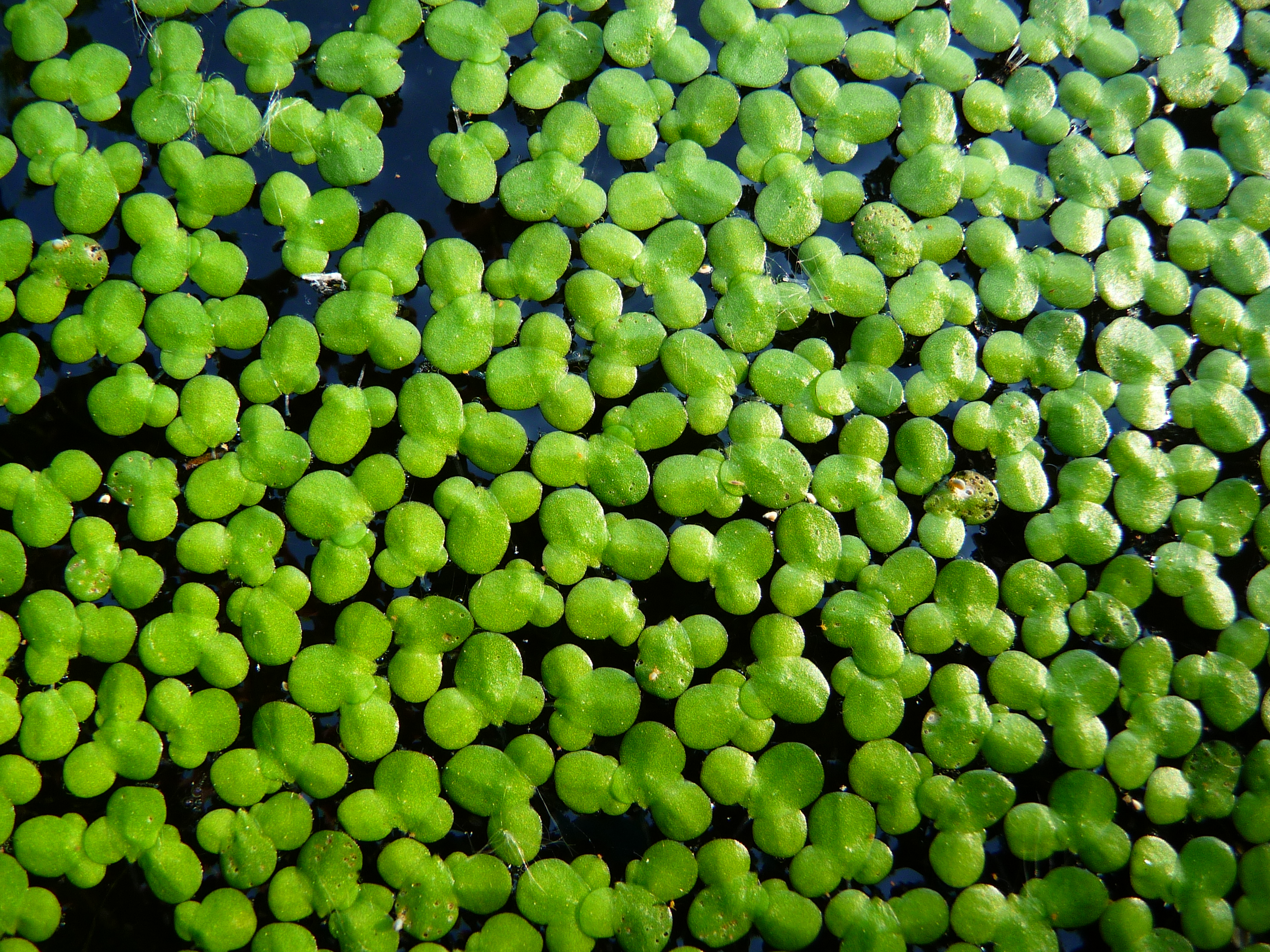 Kleine Wasserlinse (Lemna minor), umgangssprachlich "Entengrütze"